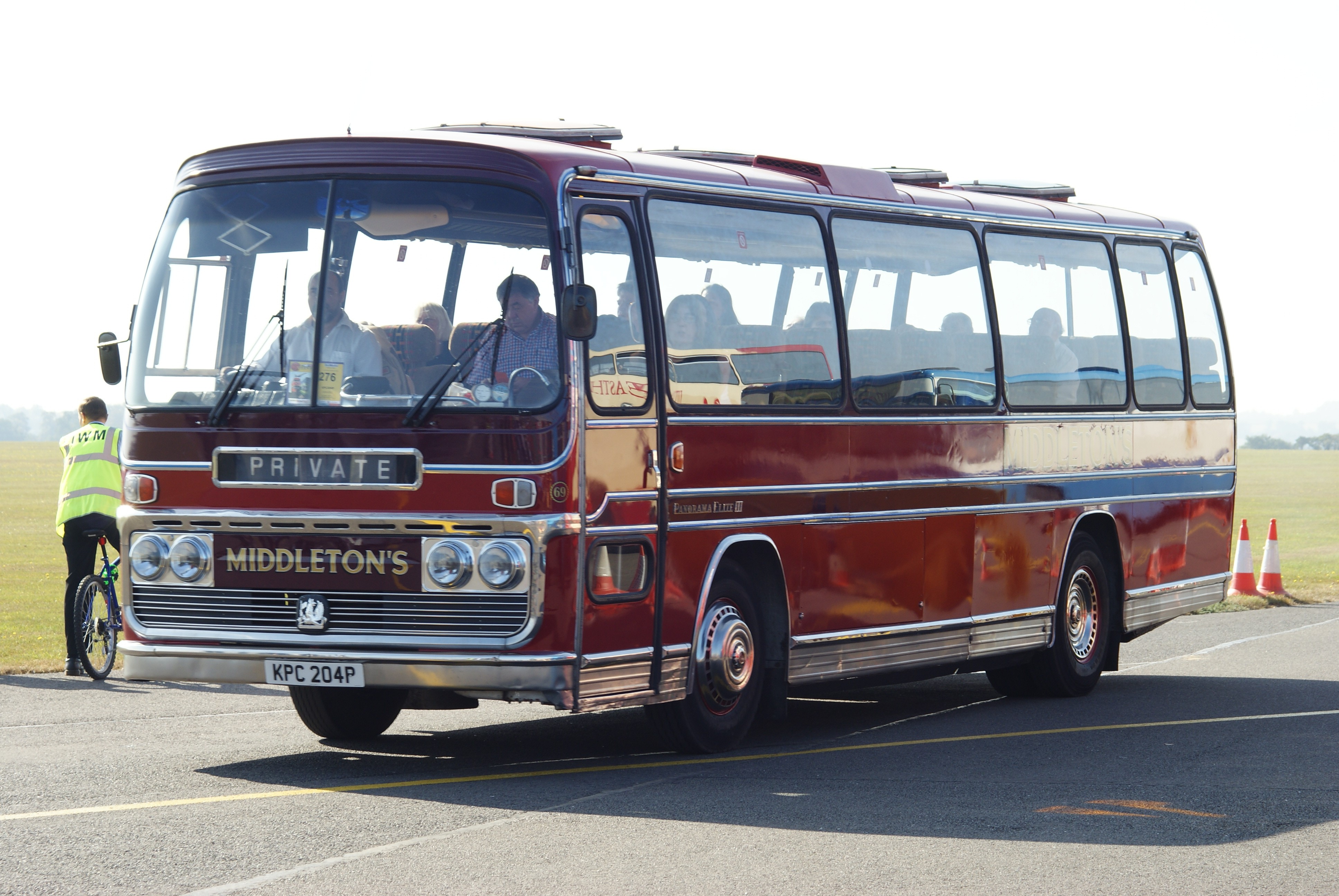 KPC204P-2 270909 CPS